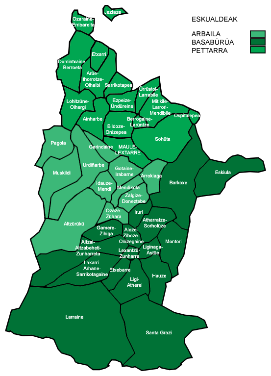 Mapa de la provincia histórica de Sola (Soule en francés, Zuberoa en euskera) con sus municipios (nombres en euskera según Euskaltzaindia).